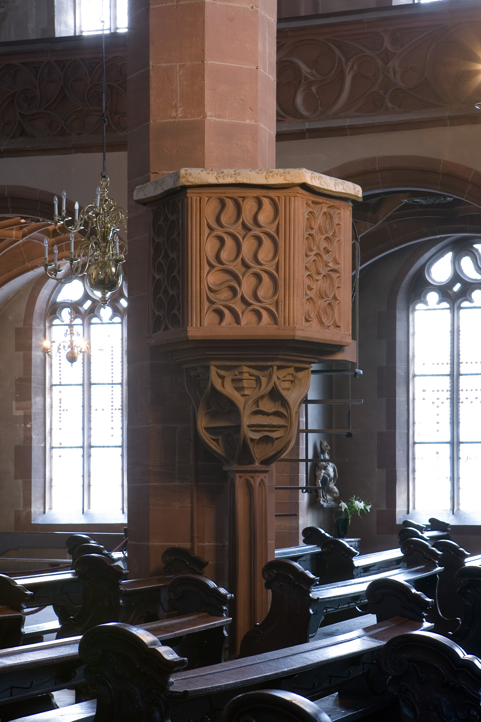 Spätgotische Kanzel (frühes 16. Jahrhundert) in der Leonhardskirche in Frankfurt am Main. Selber fotografiert im März 2008, Doppellizensierung GFDL & CC-BY-SA 2.5.